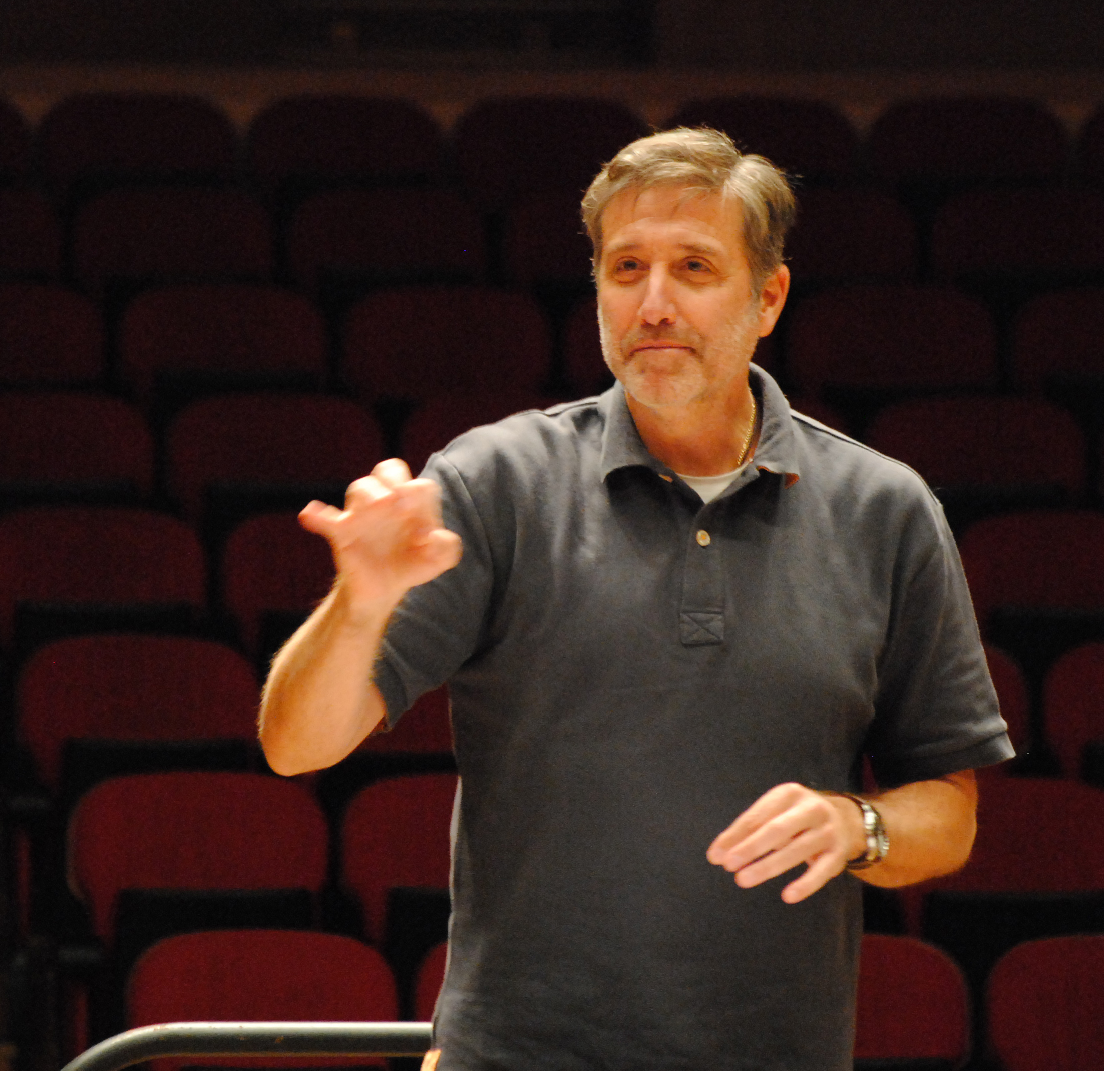 Emilio Aragón en los ensayos con la Orquesta Sinfónica de Galicia, 16 de marzo de 2015